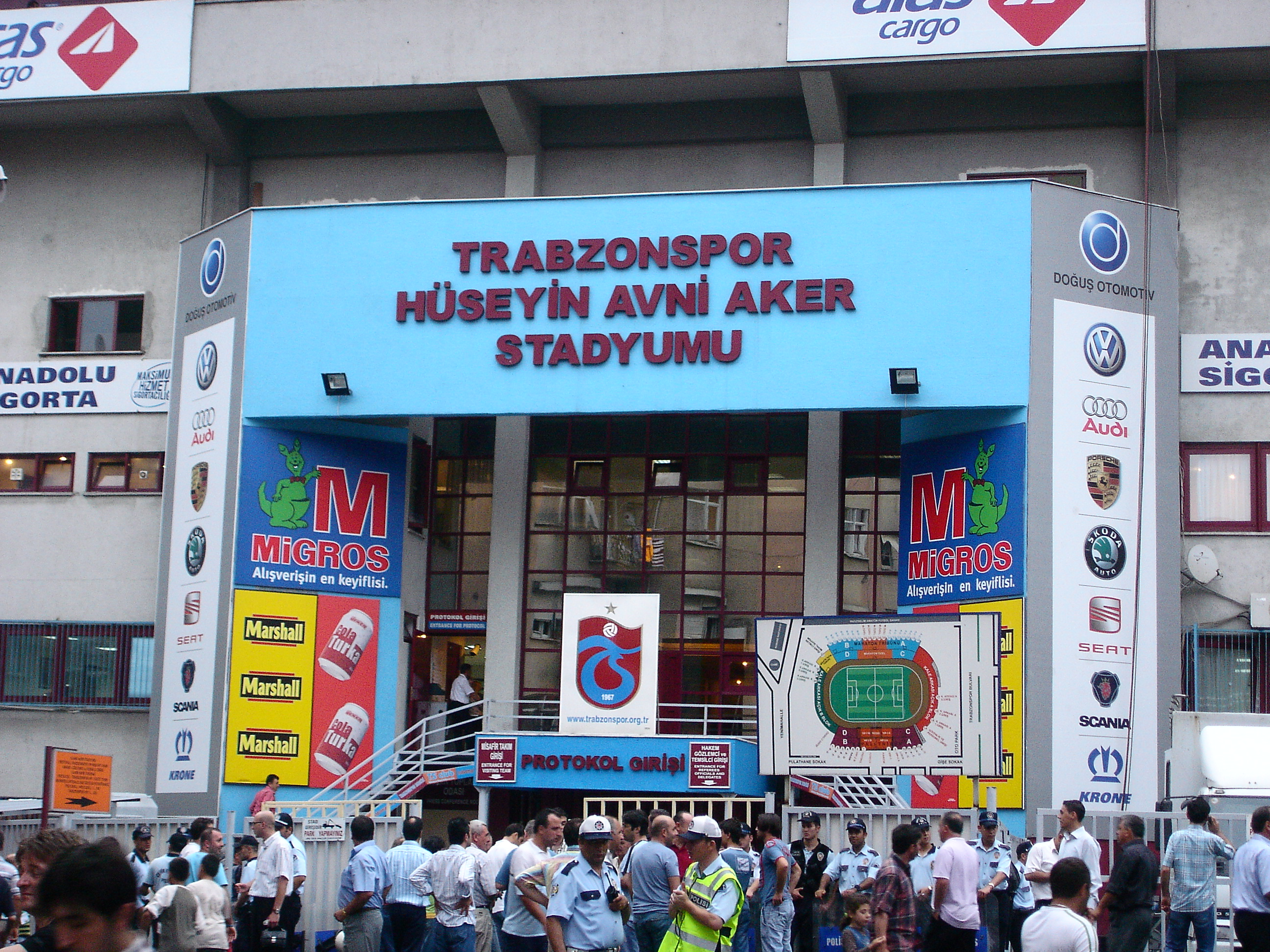 h avni aker stadyum